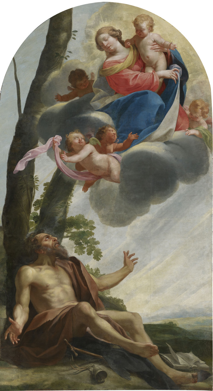 Apparition de la Vierge et de l’Enfant-Jésus à saint Antoine, huile sur toile